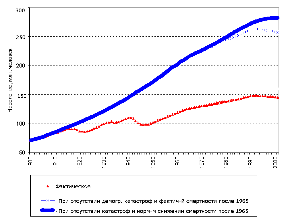 Модельное демографическое развитие России в XX веке на основе данных А.Вишневского.